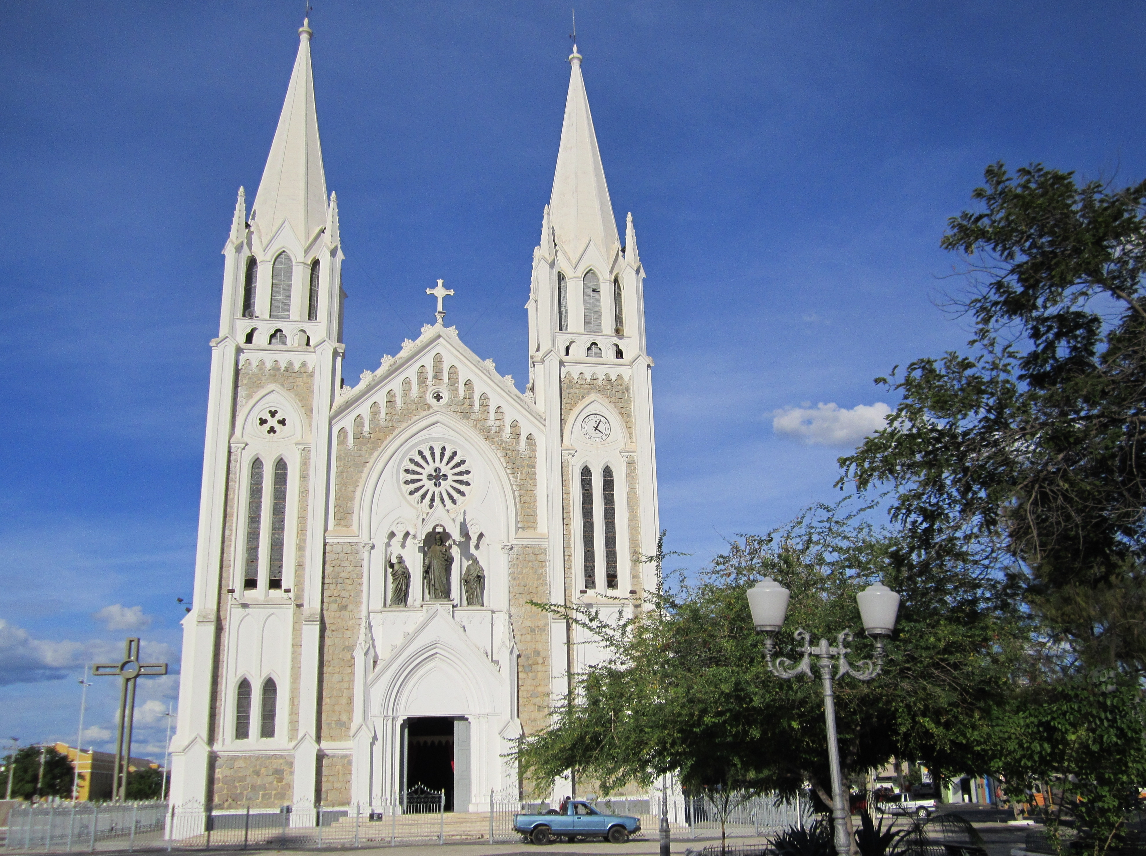 Kathedrale Igreja Sagrado Coração de Jesus, Petrolina, Pernambuco, Brasilien